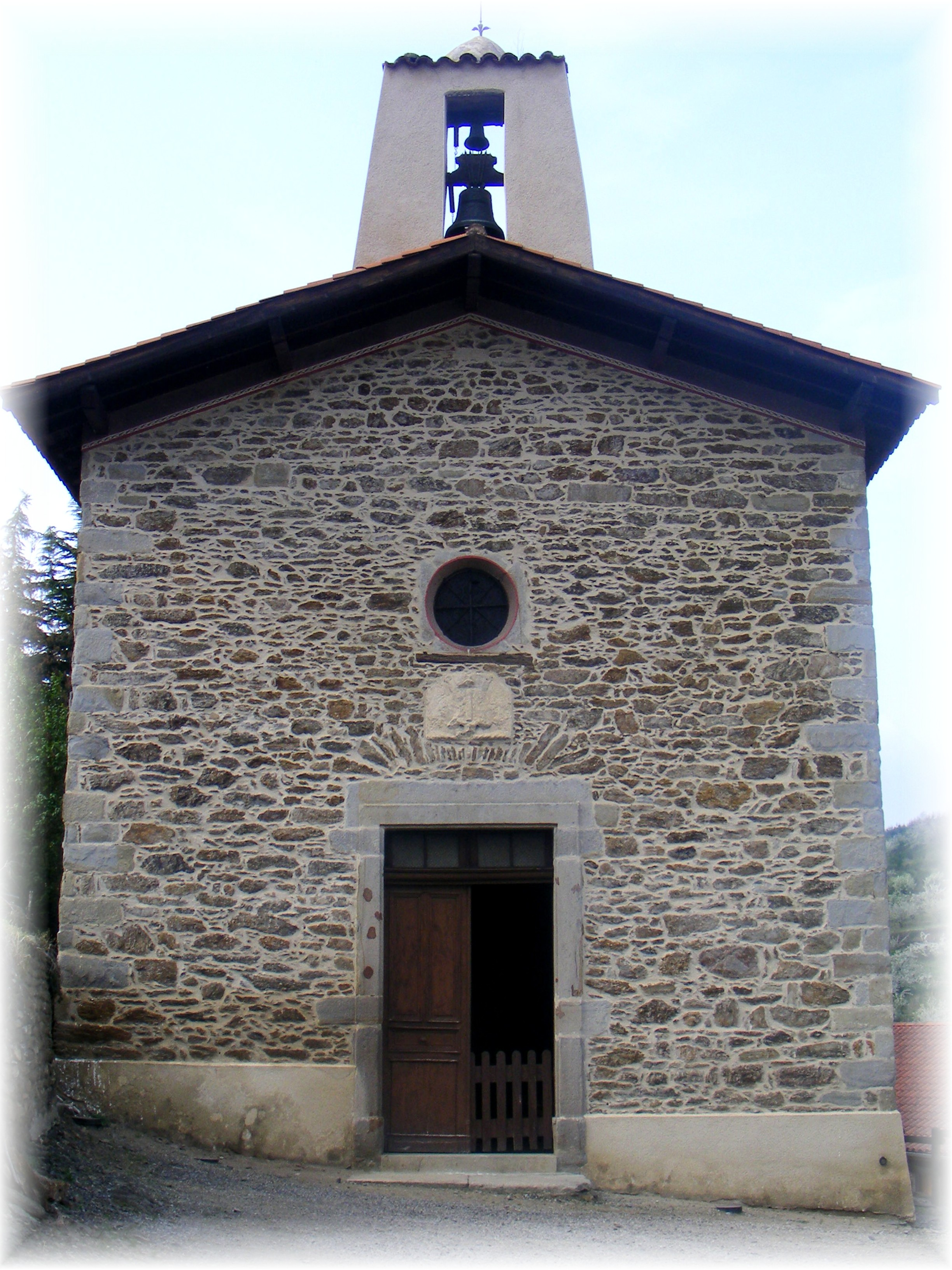 Chapelle Notre-Dame de Pitié / début du XVIII° siècle /